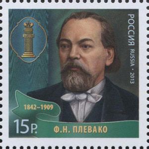 Серия "Выдающиеся юристы России"